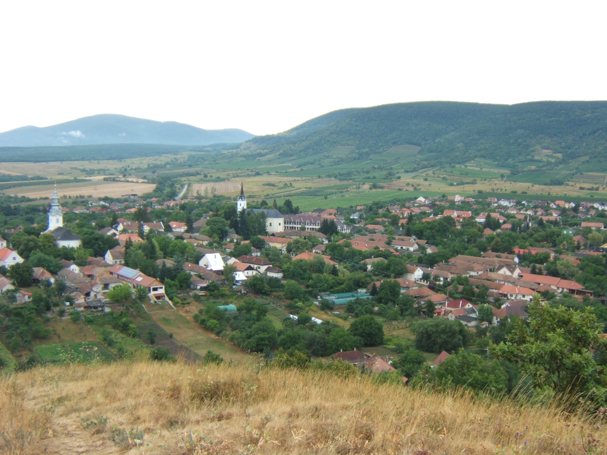 Erdőbénye, látkép